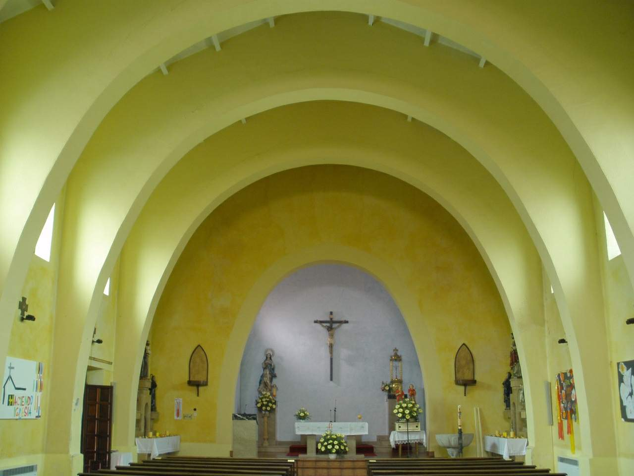 Iglesia de los Santos Justo y Pastor, en Sierrapando, Torrelavega (Cantabria)